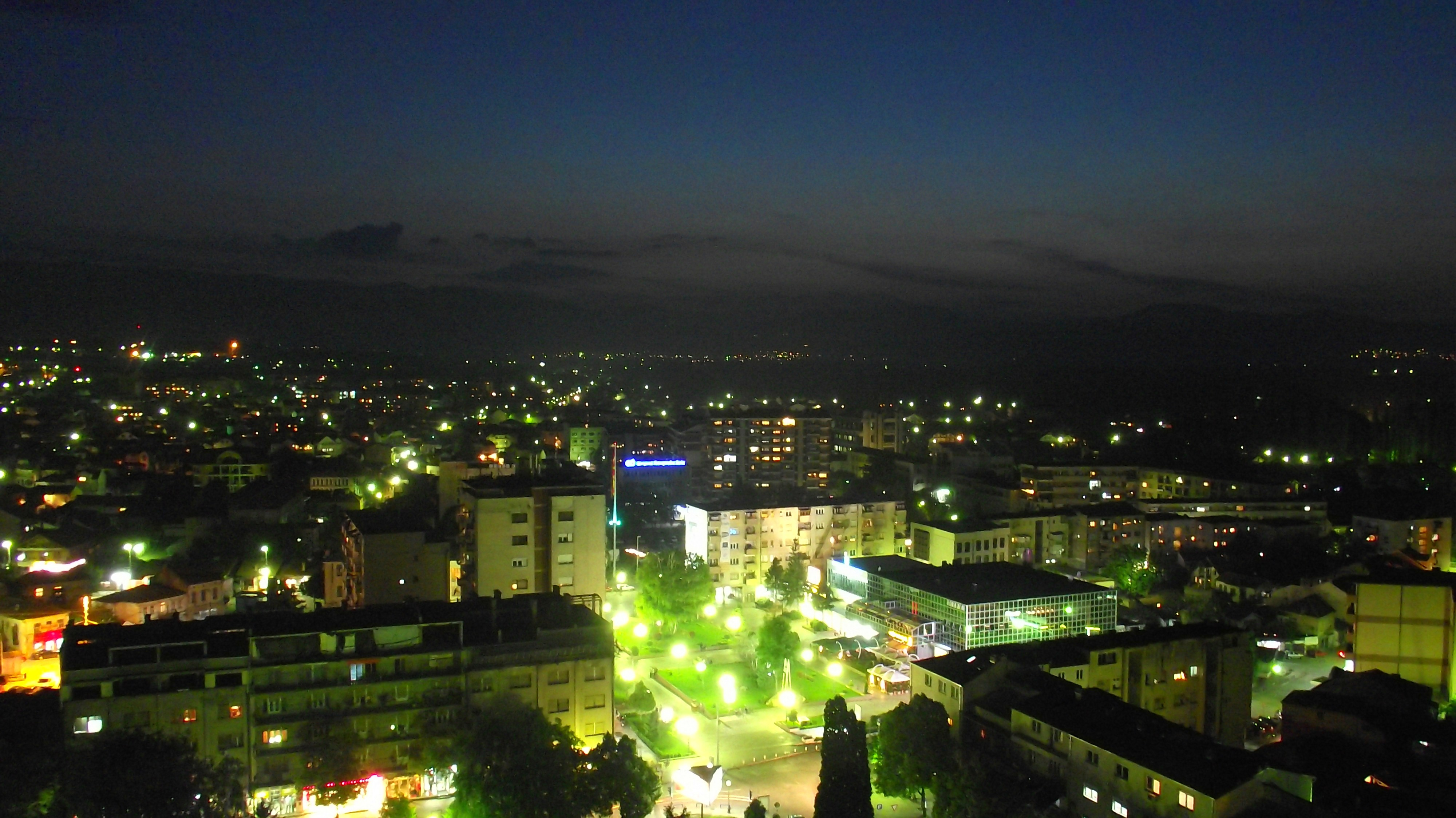 Kumanovo slikano od najvisokata zgrada navecer